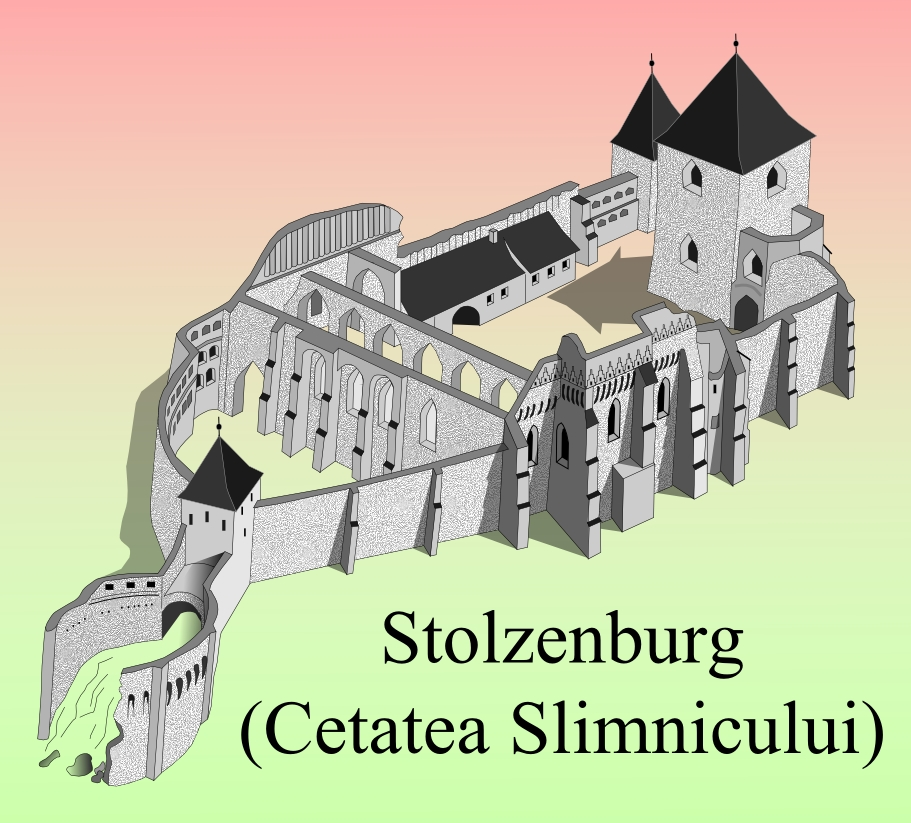 Macheta pentru Cetatea din Slimnic.